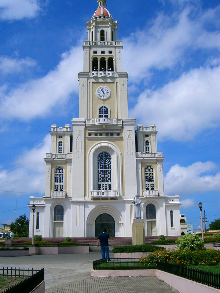 Iglesia Sagrado Corazon de Jesus Moca, Provincia Espaillat, Republica Dominicana